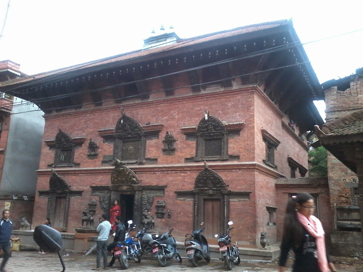 नेपाली: नवदुर्गाको द्योछैं (घर)